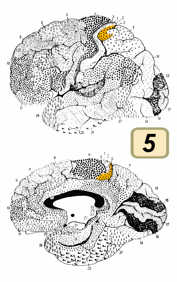 Brodmann area 5.